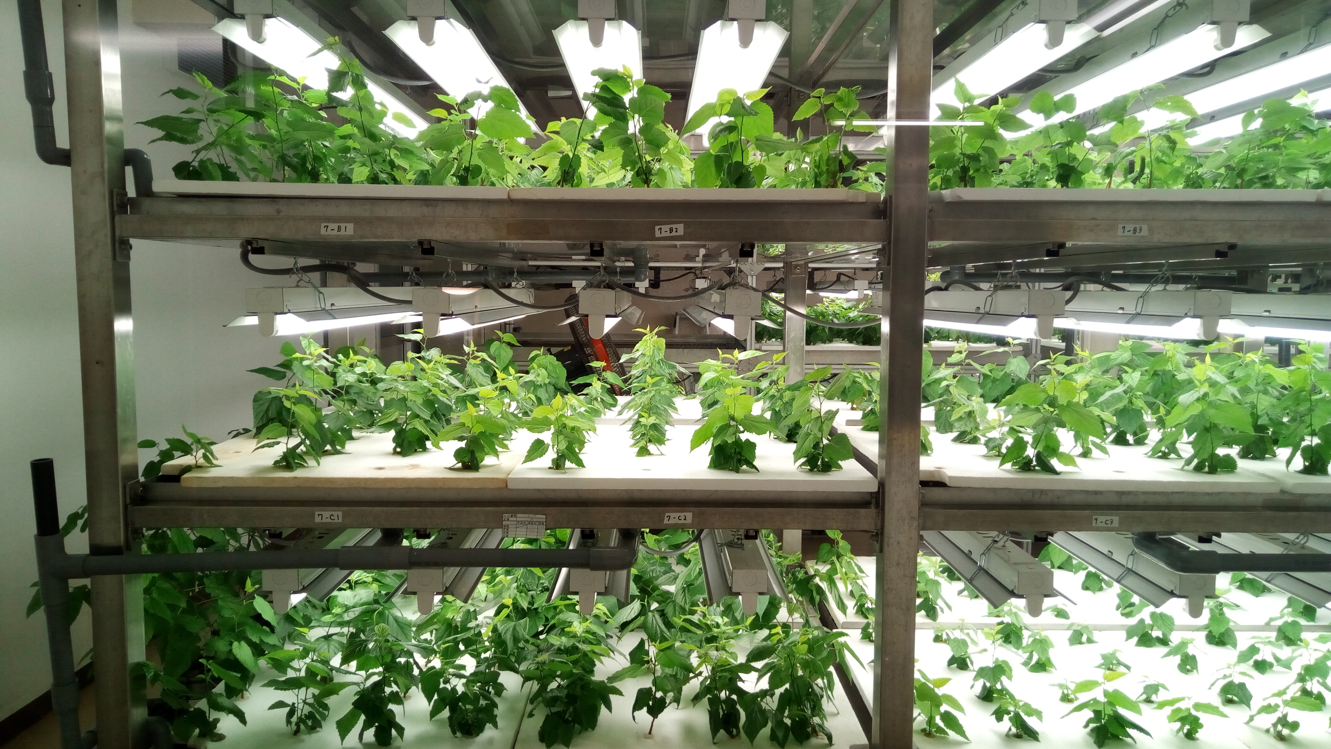 桑の水耕栽培（ストリーム、長野県岡谷市）